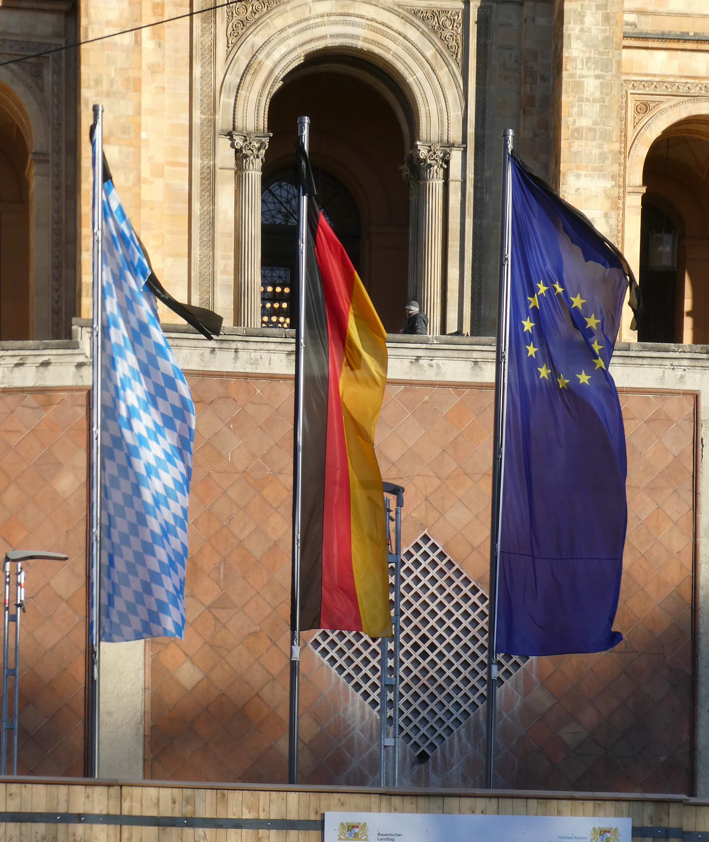 Am Tag nach dem Anschlag in Hanau wehen die Flaggen vor dem Maximilianeum mit Trauerflor.